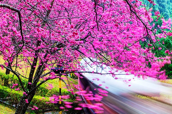 中文（台灣）: 南投魚池鄉